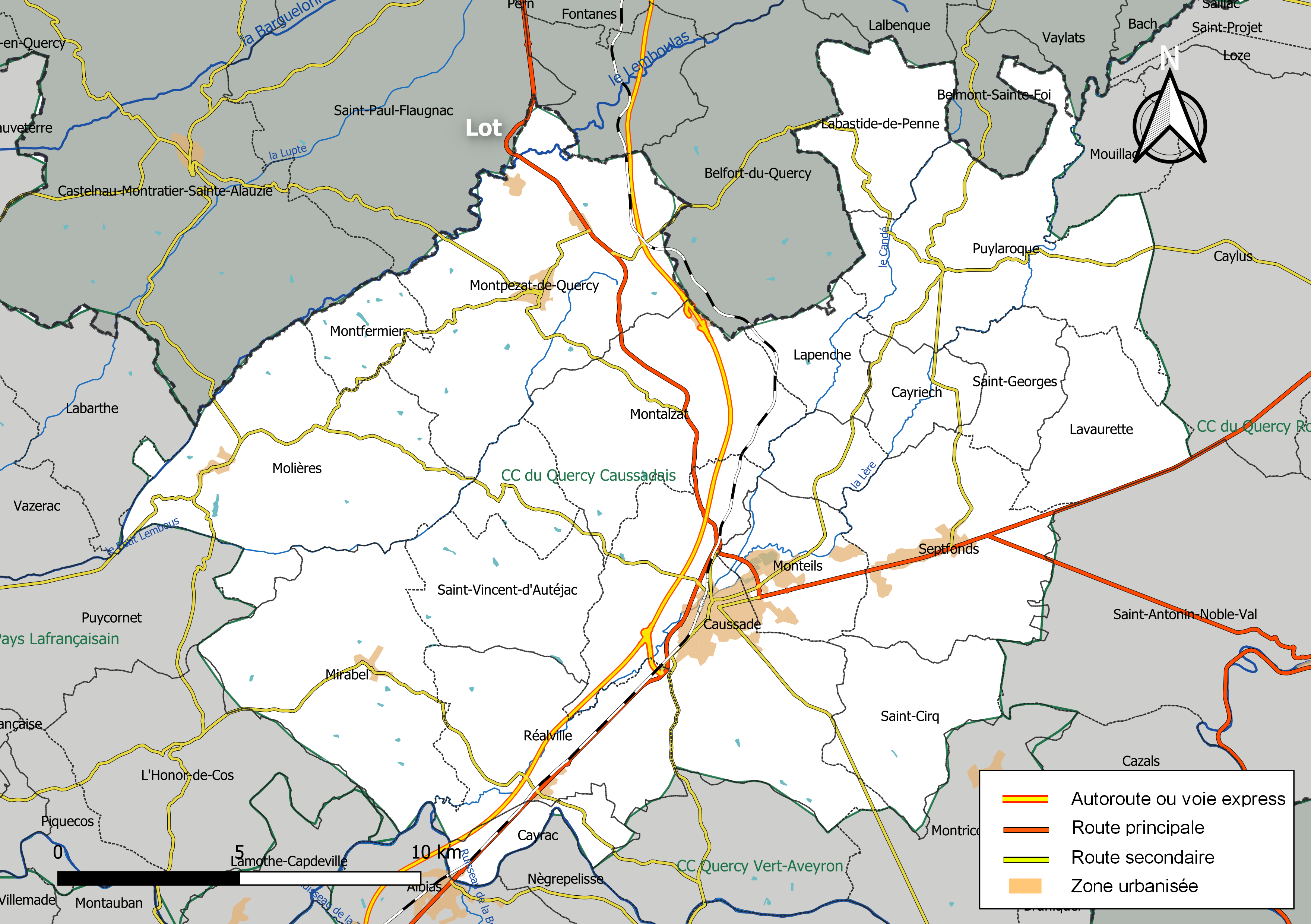 Carte géographique de la Communauté de communes du Quercy caussadais, département de Tarn-et-Garonne, France. Composition au 1er janvier 2019.